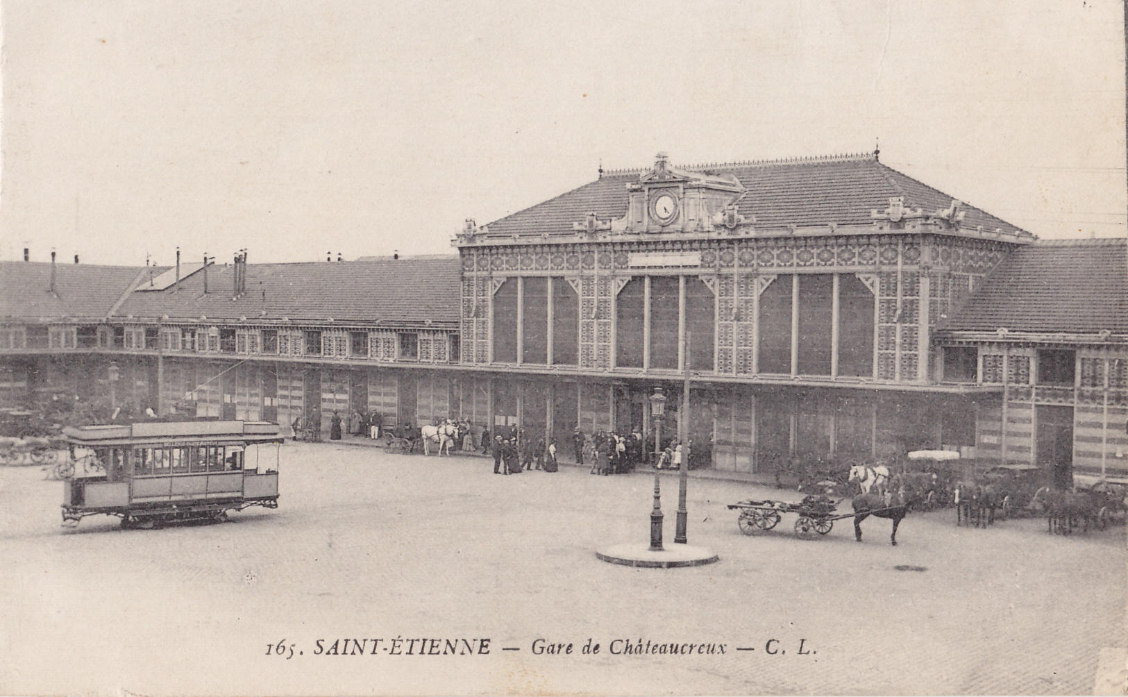 Carte postale ancienne éditée par C. L., n°165 : SAINT-ETIENNE - Gare de Chateaucreux